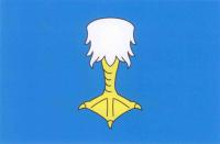 Kokory, vlajka